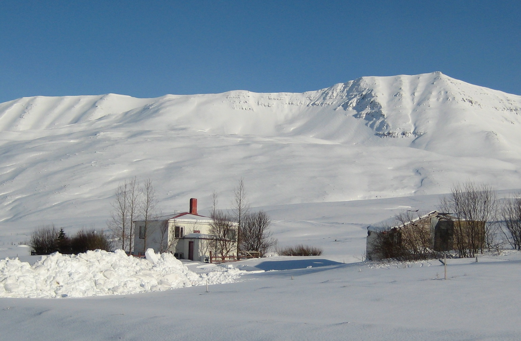 Tungufell í Svarfaðardal